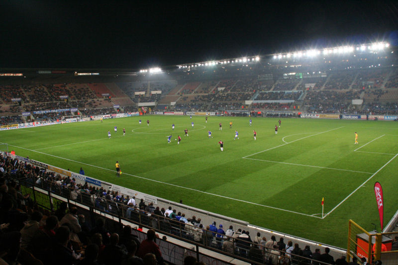 Le stade du Racing Club de Strasbourg à la Meinau